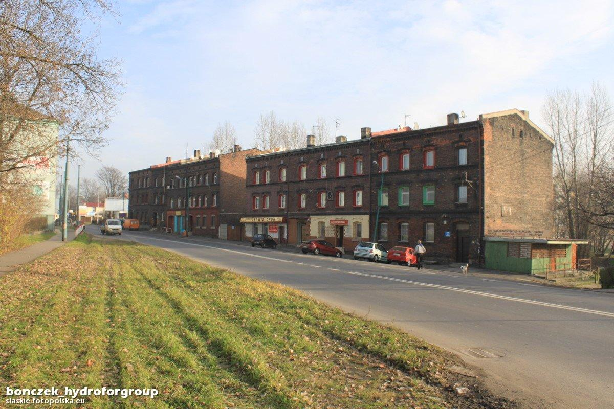 Tramwajów już nie ma na ulicy Kościuszki :-(